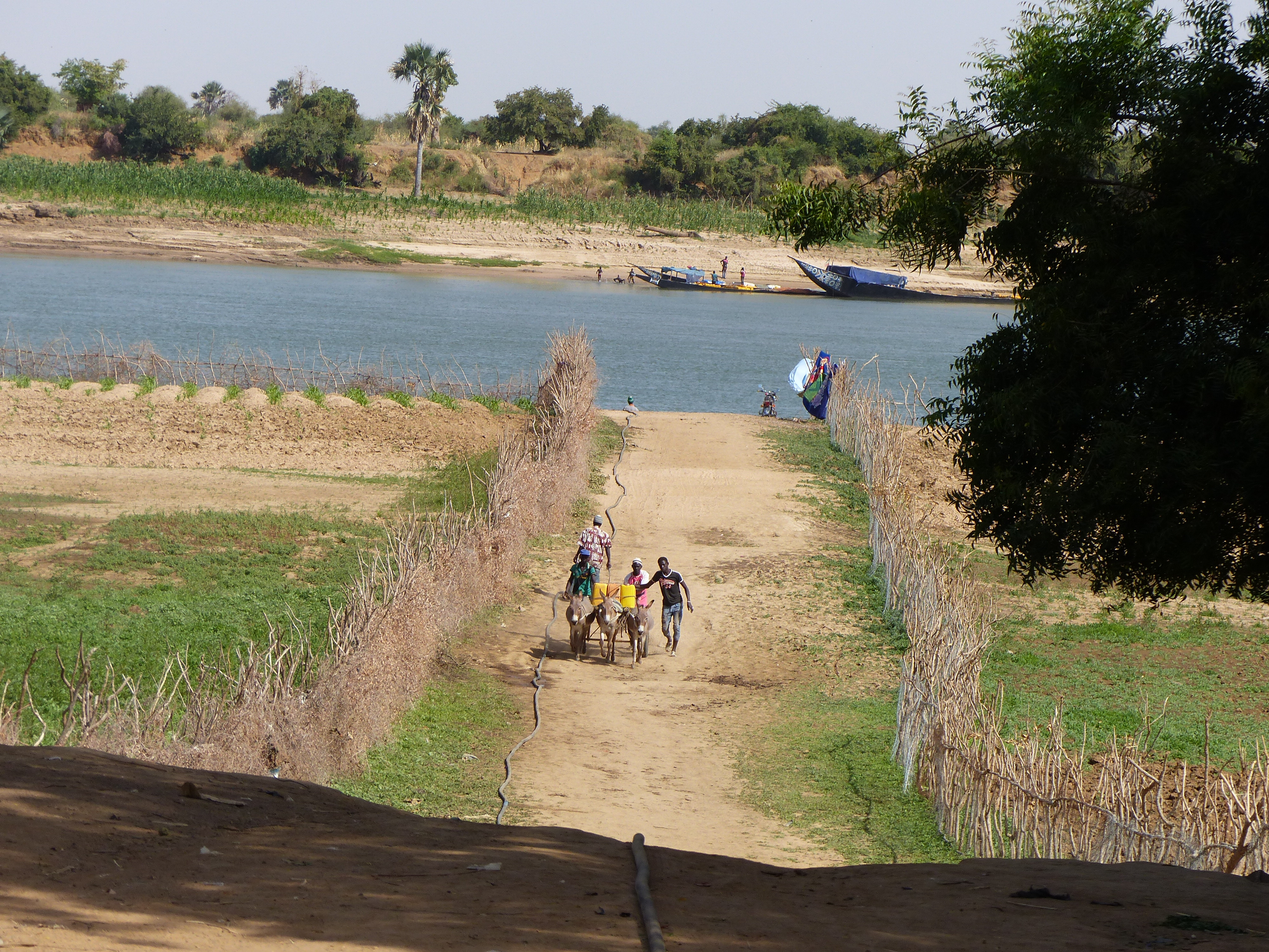 Senegal-Fluss Lany-Tounka im afrikanischen Mali